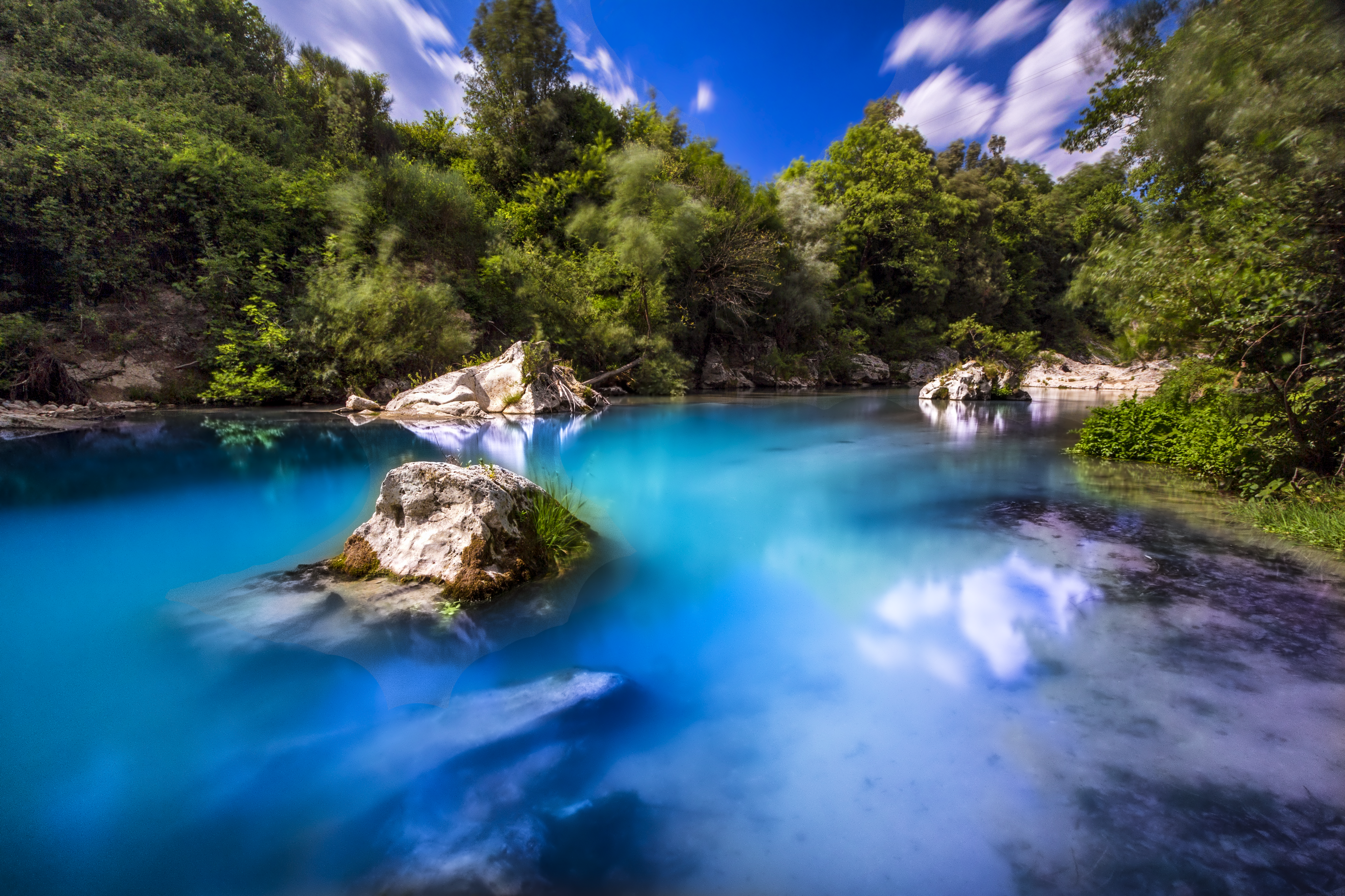 Oasi di Persano This is a photo of a monument which is part of cultural heritage of Italy. The authorisation for taking photos of this object was provided by the World Wide Fund for Nature Italy.